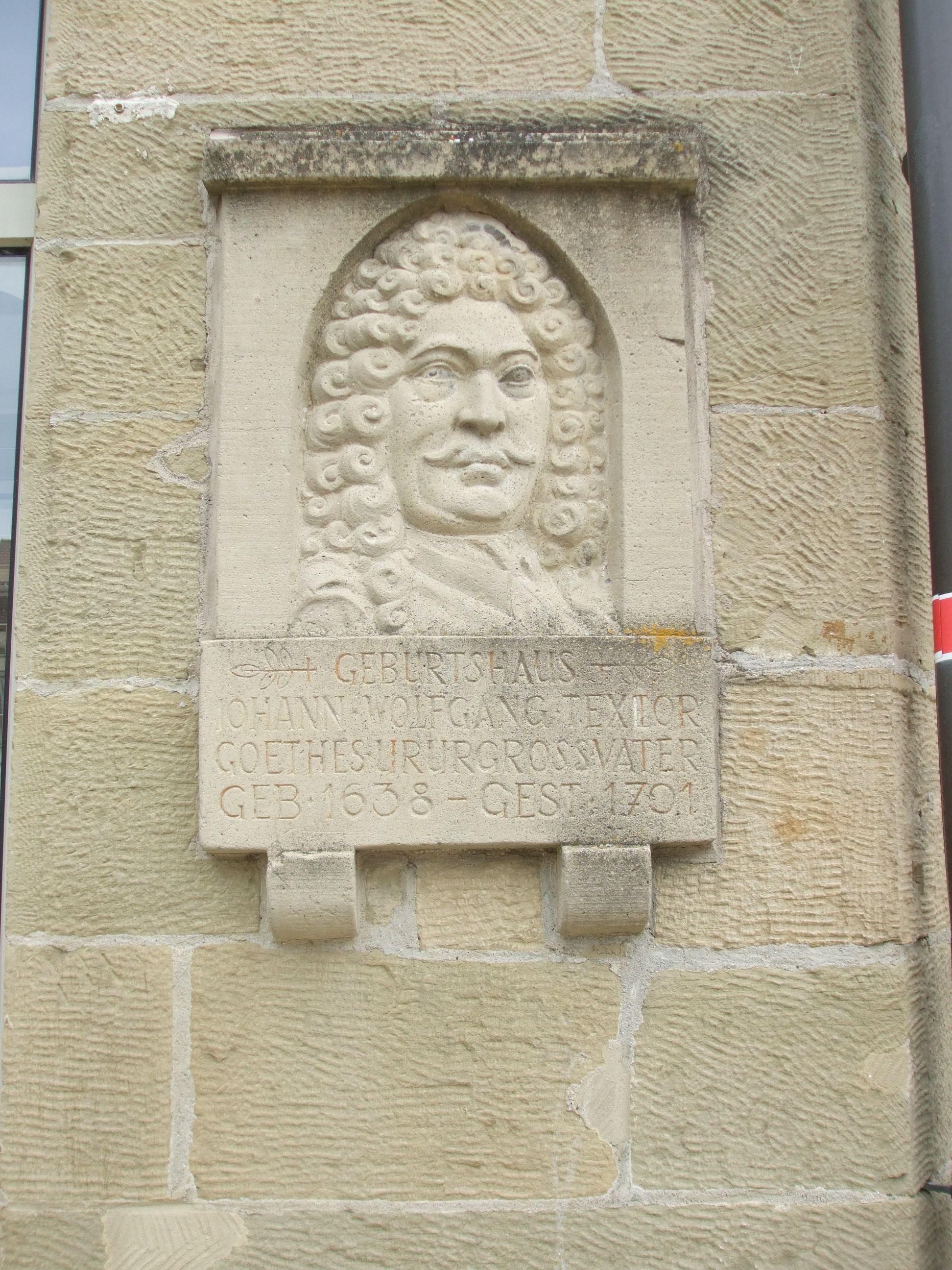 Steinbildnis von Johann Wolfgang Textor, der Ältere *1638-1701 aufgenommen im Neuenstein (Hohenlohe).